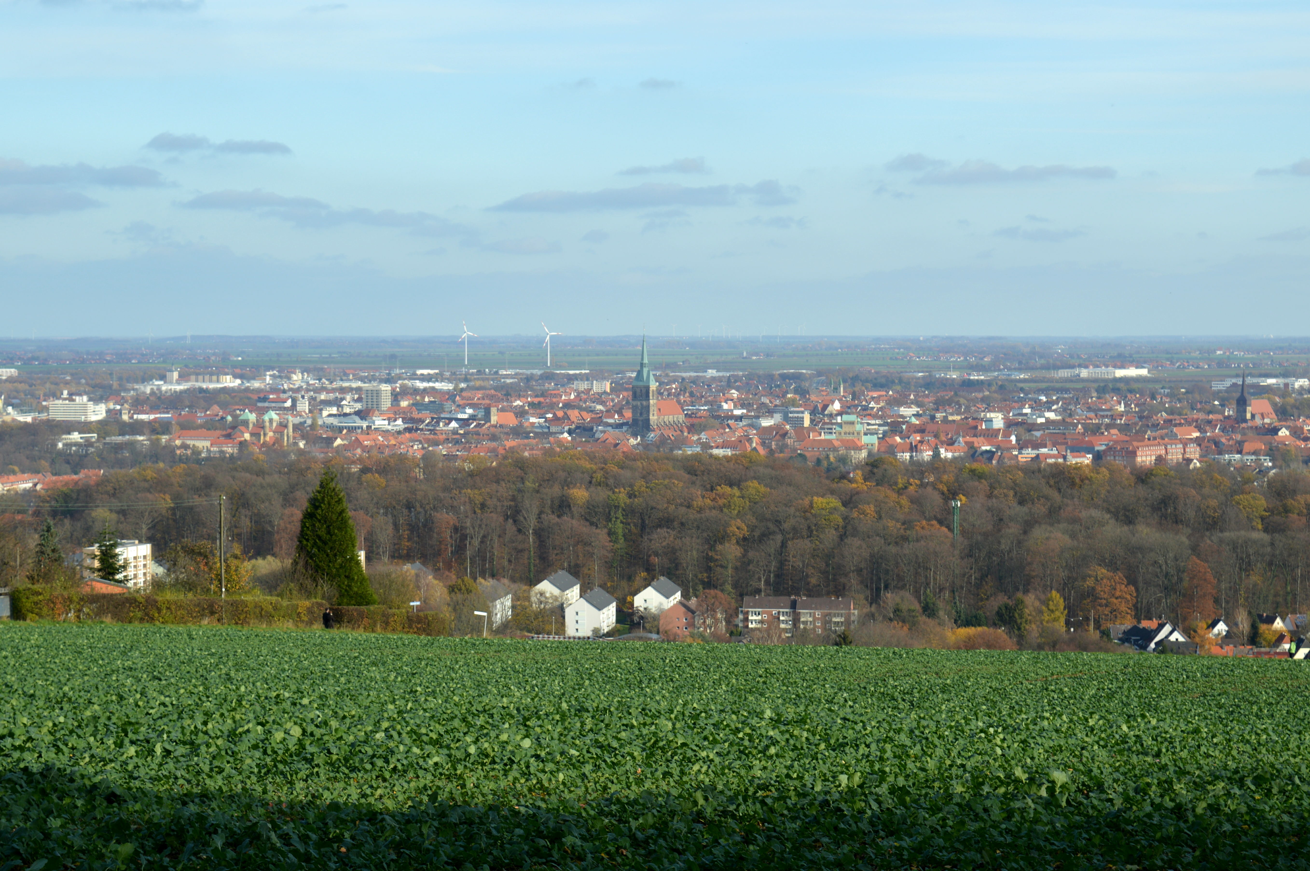 Landschaftsschutzgebiet Rottsberghang - Blick nach Hildesheim (2)